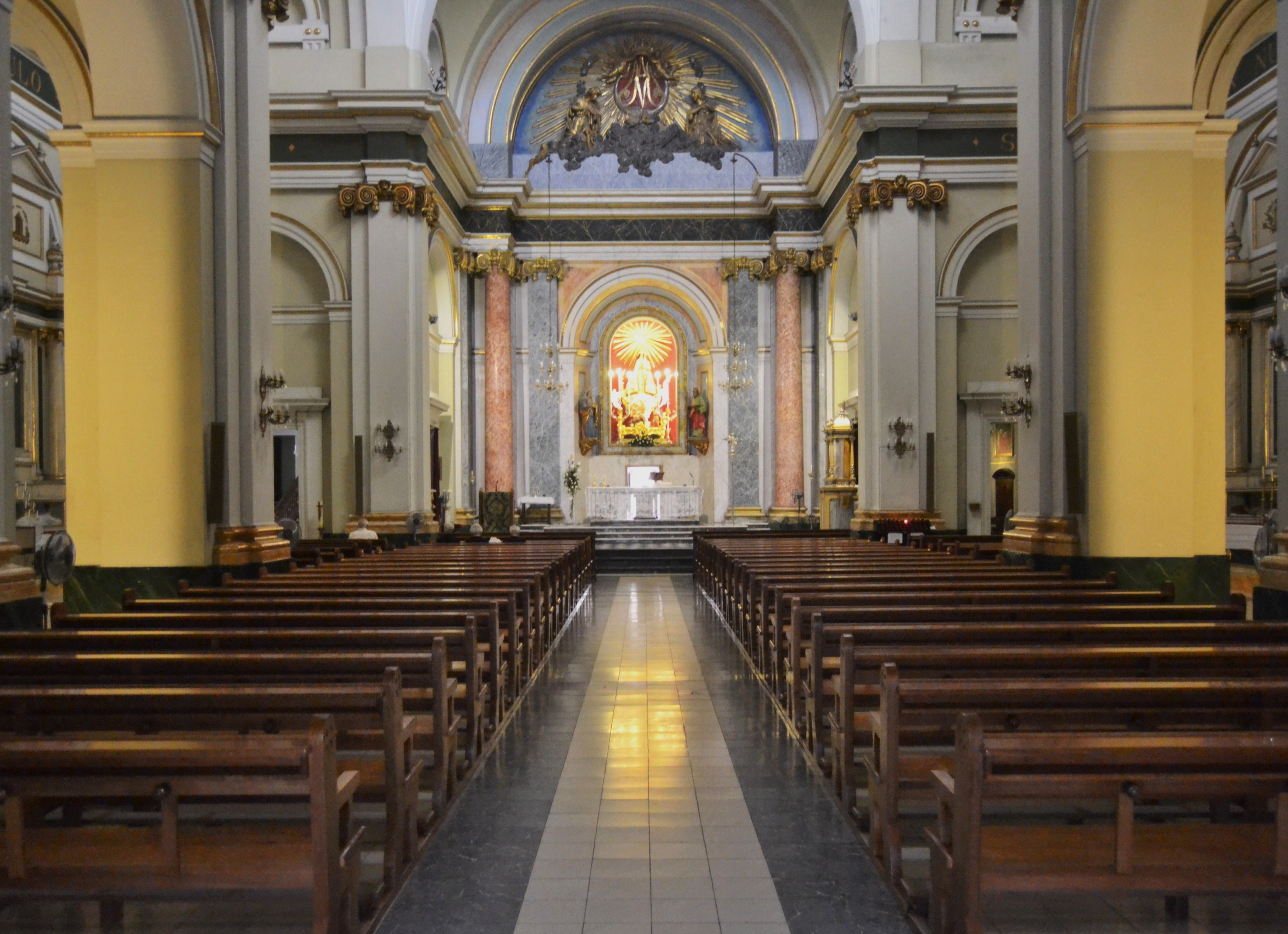 Interior de l'església de santa Maria de Xaló. 30.081-009.